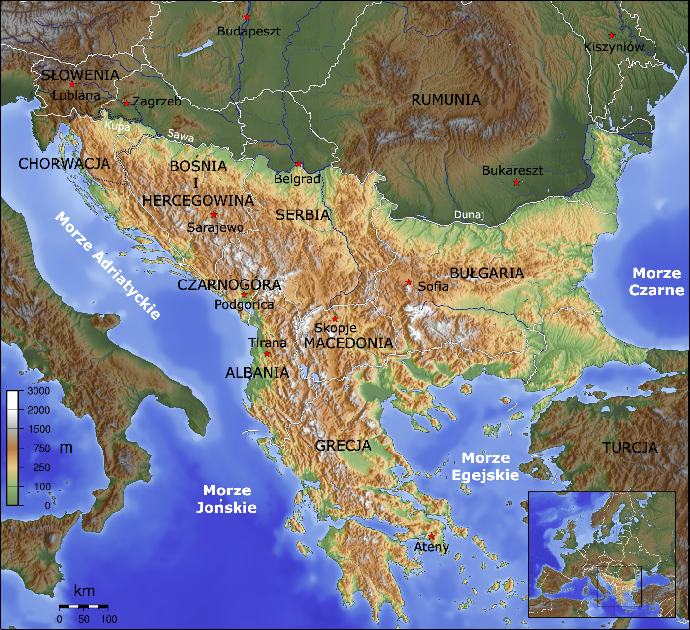 German version: Image:Balkan_topo_de.jpg English version: Image:Balkan_topo_en.jpg Polish version: Image:Balkan_topo_pl.jpg